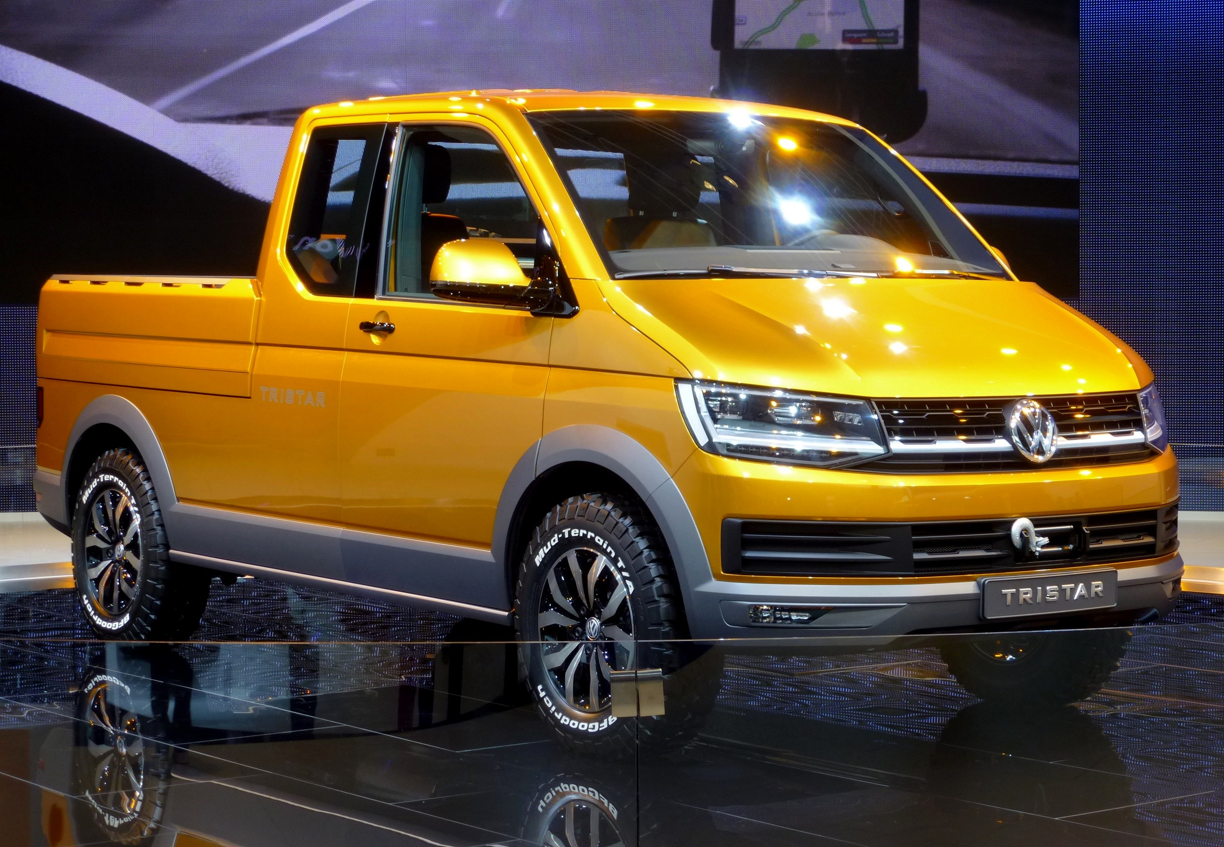 VW Tristar Concept